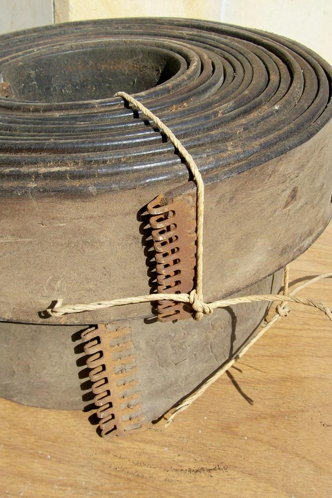 Leder-Flachriemen aus der Zeit der Transmissions-Antriebe von Werkzeugmaschinen